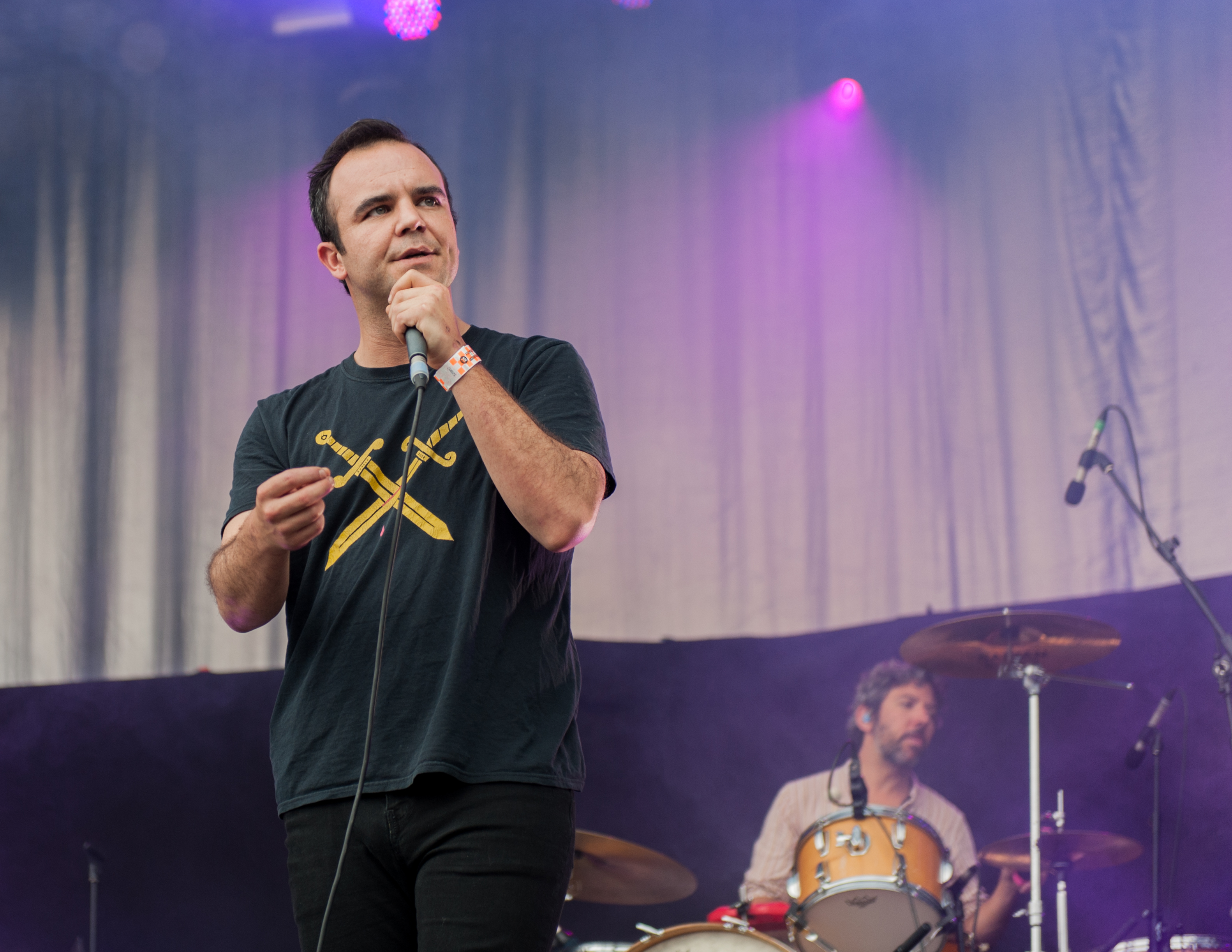 Die Band Future Islands auf dem Kosmonaut Festival 2015 in Chemnitz Oberrabenstein.